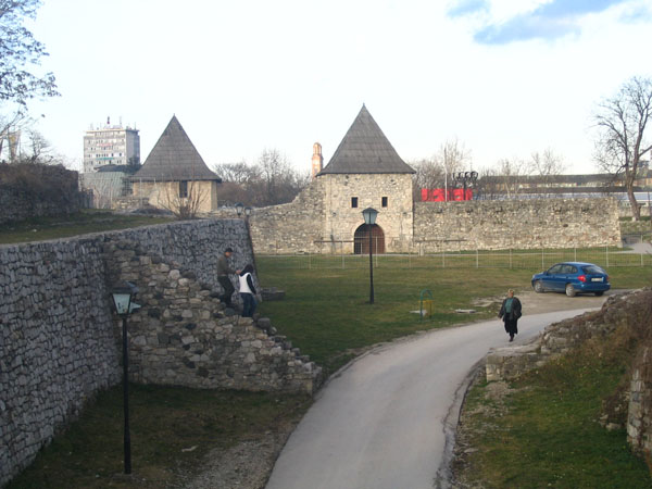 Тврђава Кастел